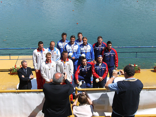 Il canoista Antonio Rossi (secondo da sinistra nel gruppo di atleti in tuta biancazzurra)